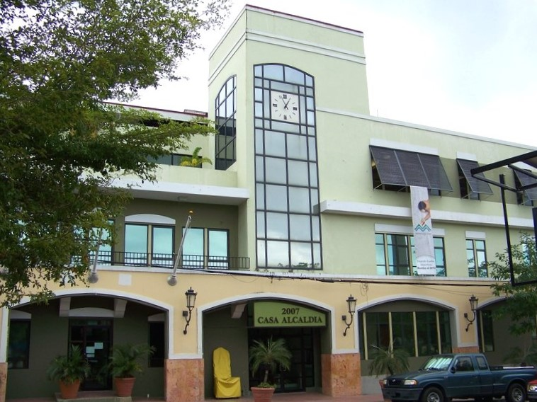 Casa Alcaldía de Rincón, P.R.